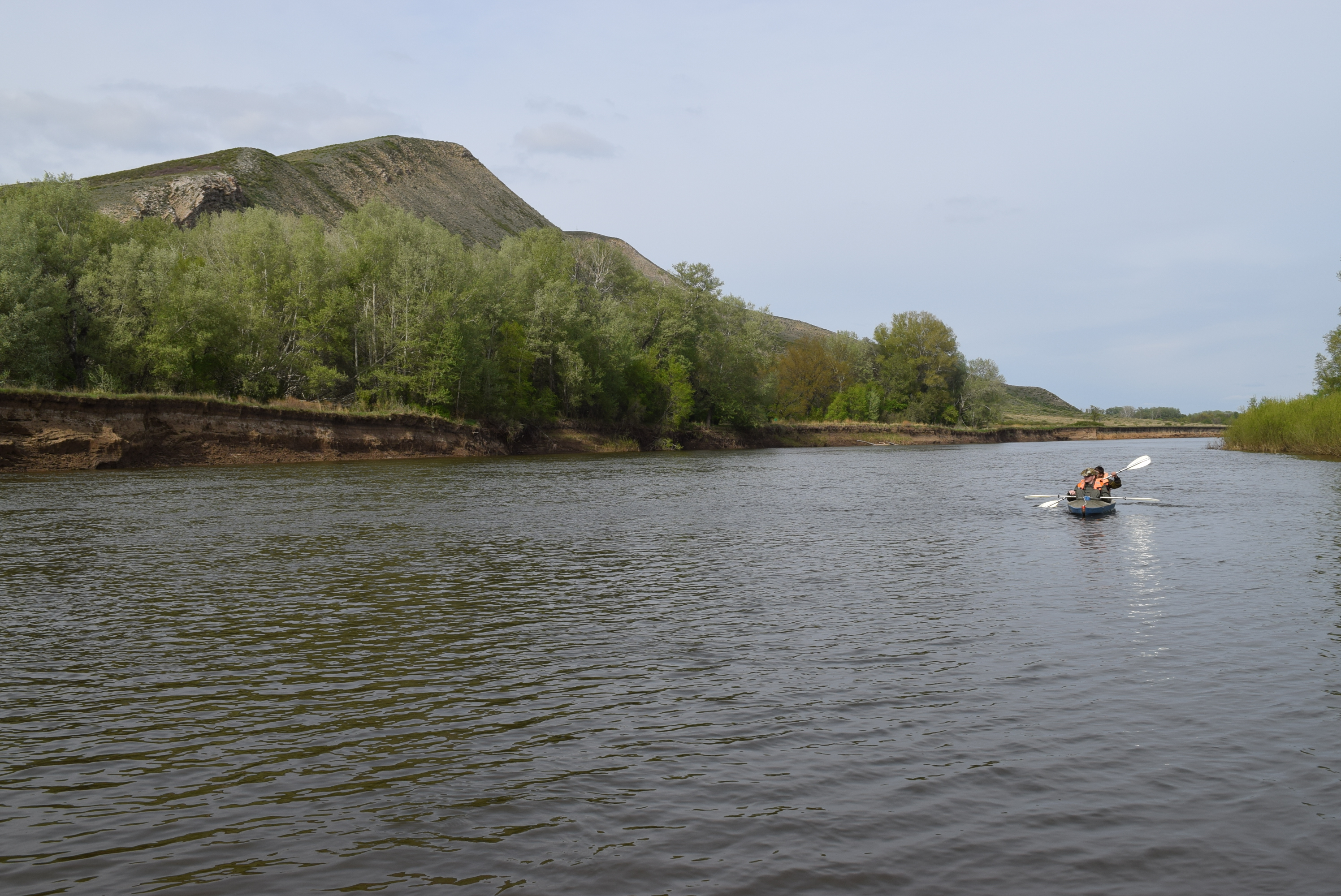 Гора Дюяташ (Верблюжка), Беляевский район This image is related to the protected area of Russia number 5610009